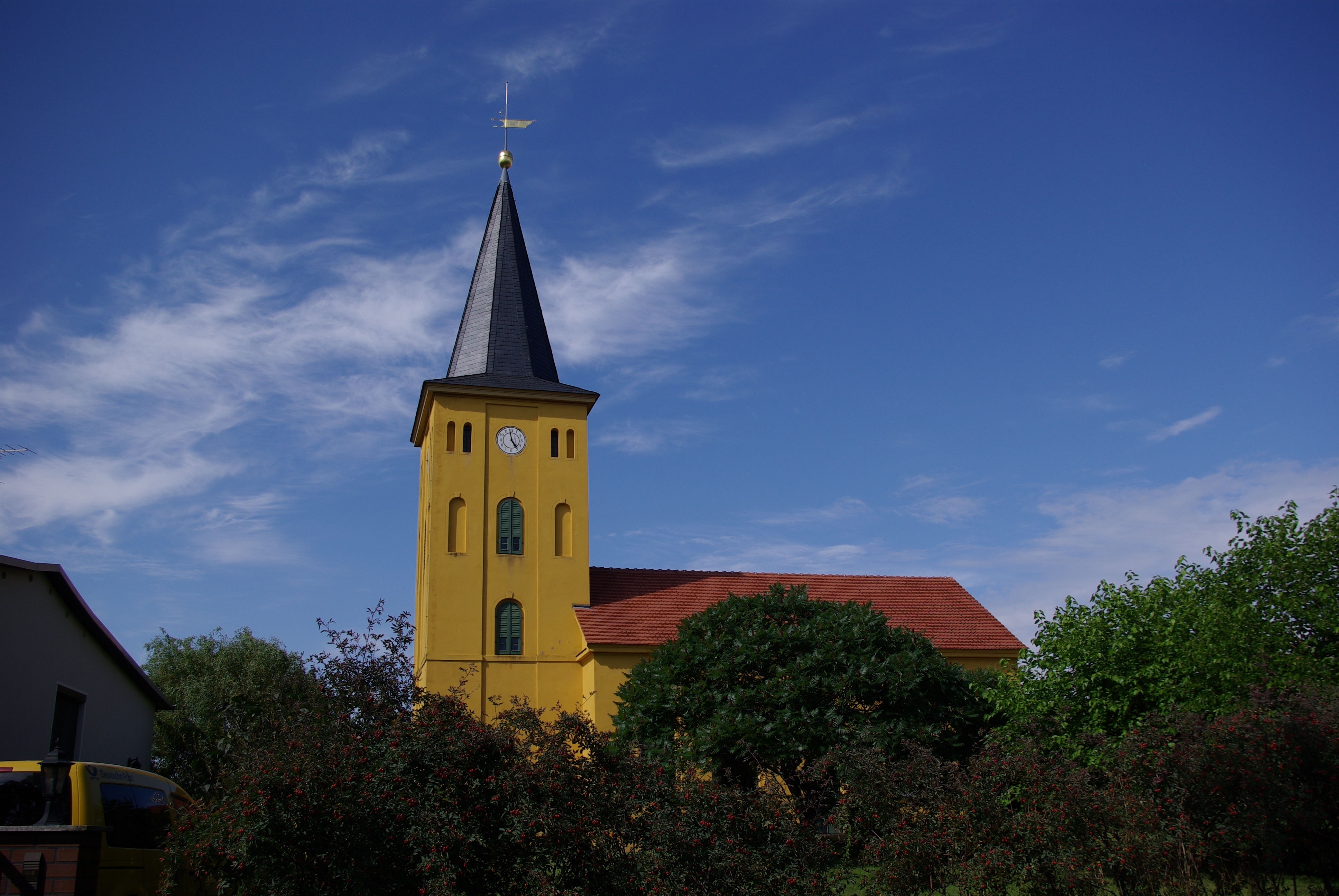 Mühlenberge in Brandenburg. Die Kirche im Ortsteil Senzke stammt aus dem Jahre 1857 und ist im Stil der Schinkel-Nachfolger erbaut worden.